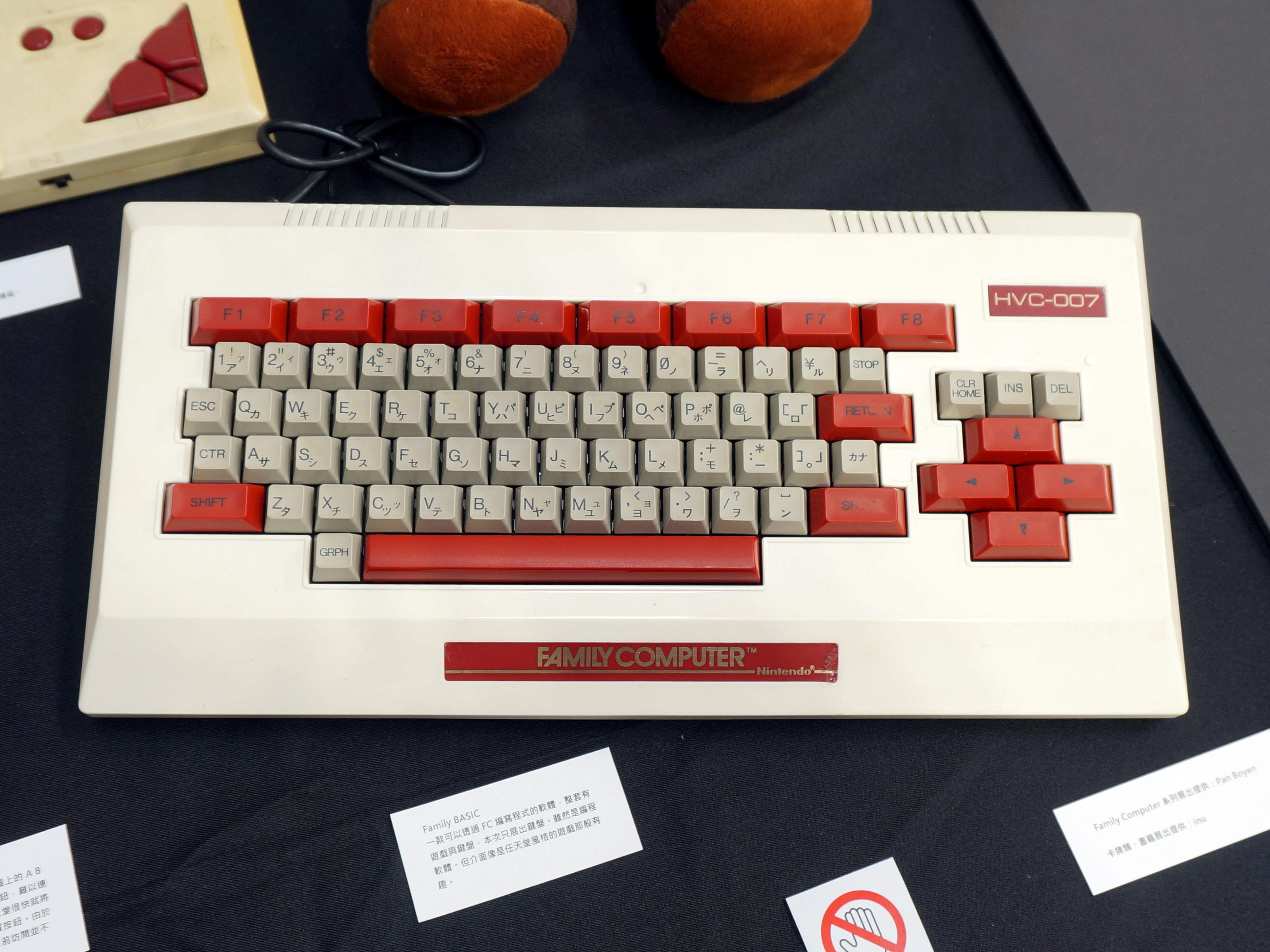 巴哈姆特電玩資訊站23週年站聚，任天堂紅白機專用鍵盤HVC-007。